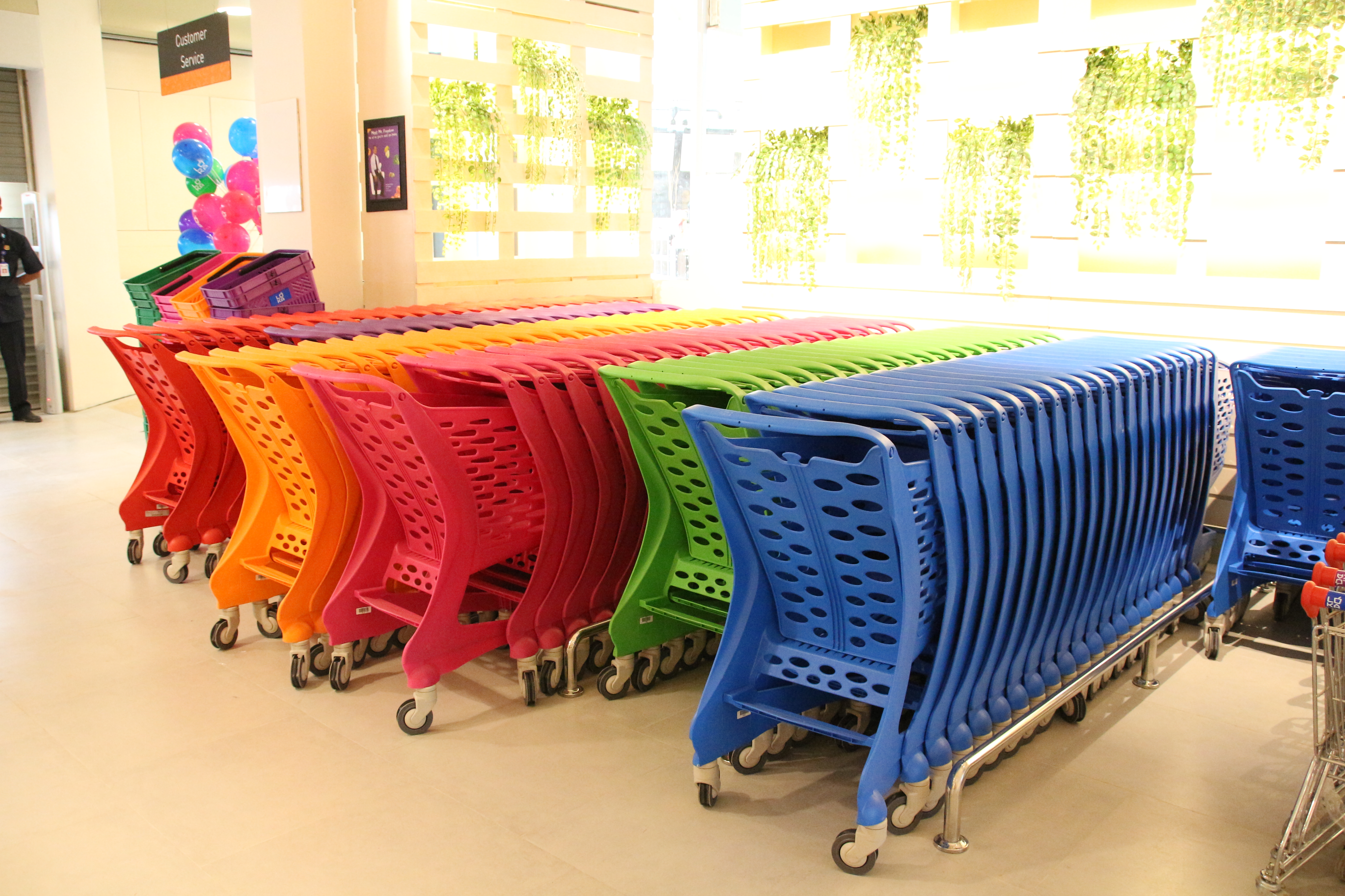 Troli dengan berbagai pilihan warna